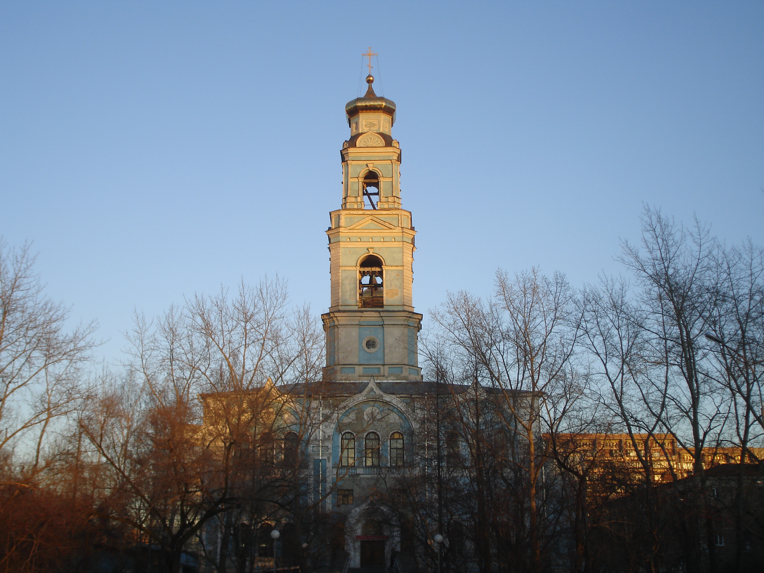 Храм Вознесения Господня в Екатеринбурге